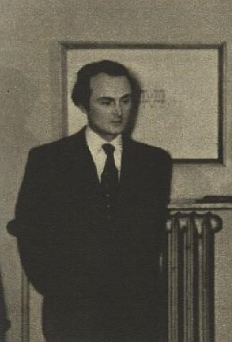 Jaroslav Paur (1918-1987), český malíř období civilismu, realismu a abstrakce.